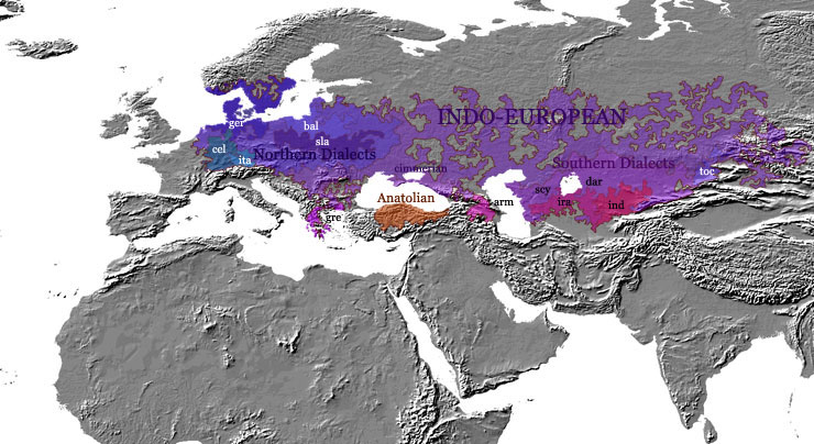 Indo-European hypothetical expansian from the Pontic steppes.